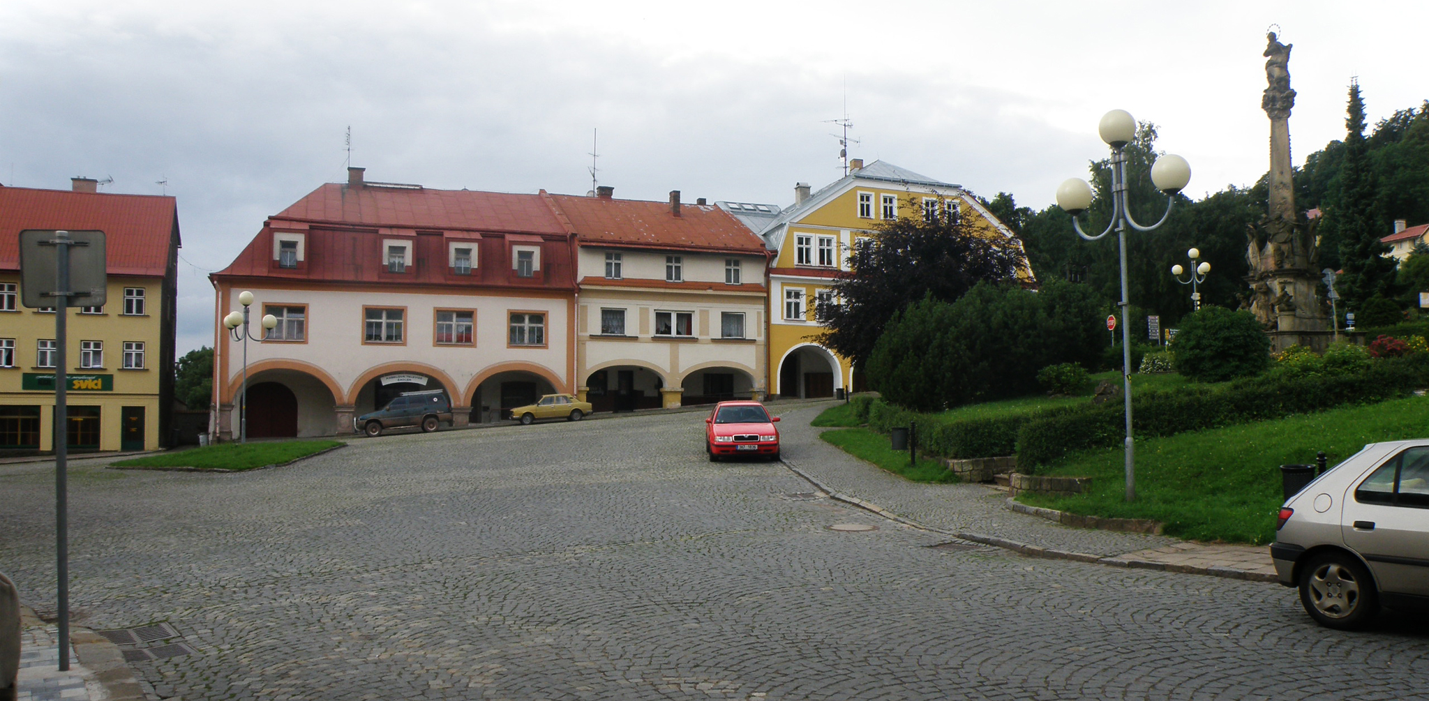 Měšťanský dům, Rýchorské náměstí 117, 116, 118, Žacléř, 25.7.2009